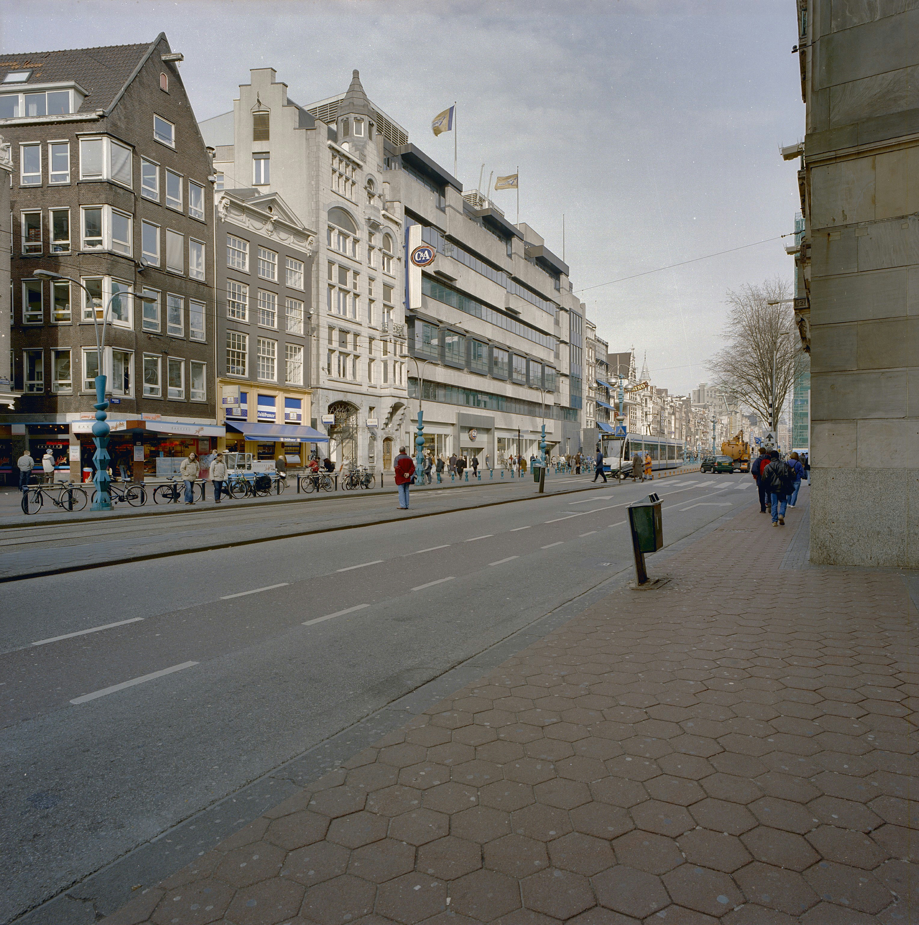 Gevelwand/ Straatbeeld: Gevelwand met straatbeeld